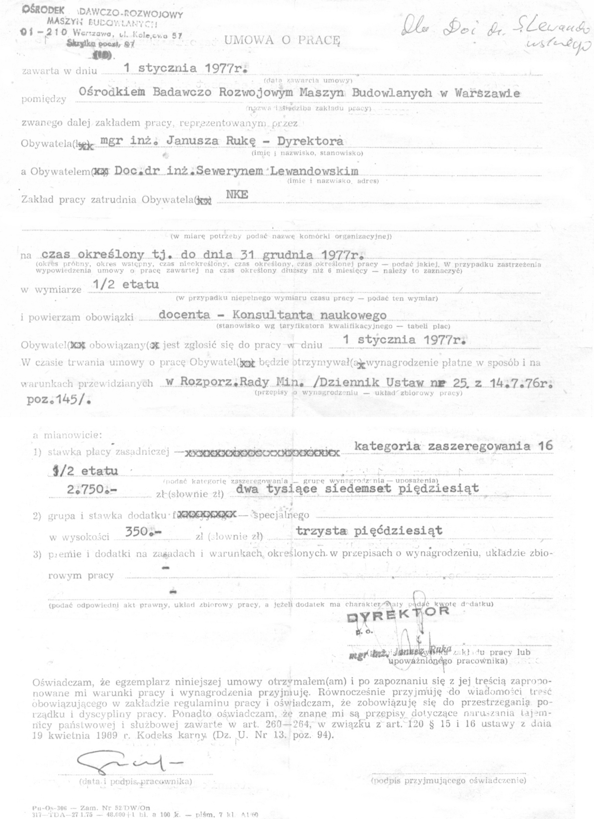 Poświadczenie zatrudnienia w Ośrodek Badawczo-Rozwojowy Maszyn Budowlanych